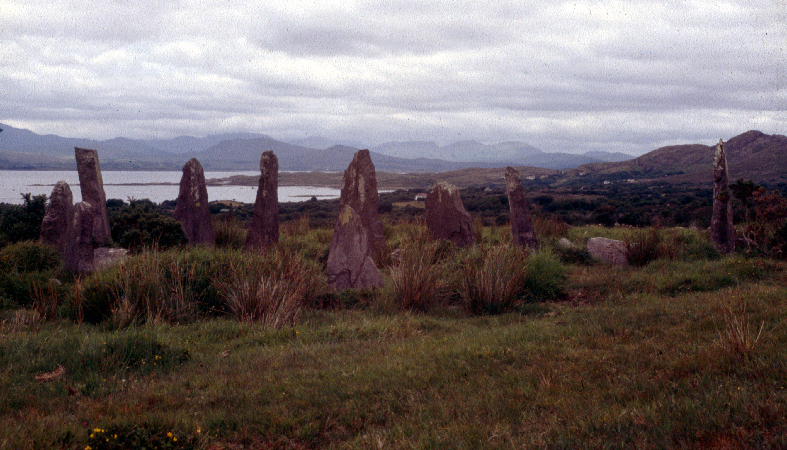 Ardgroom